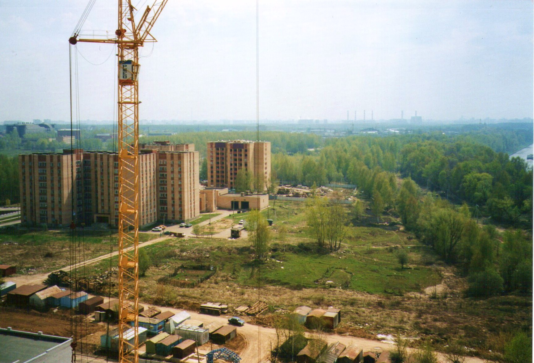 Кран КБМ-401П на строительстве дома в Долгопрудном